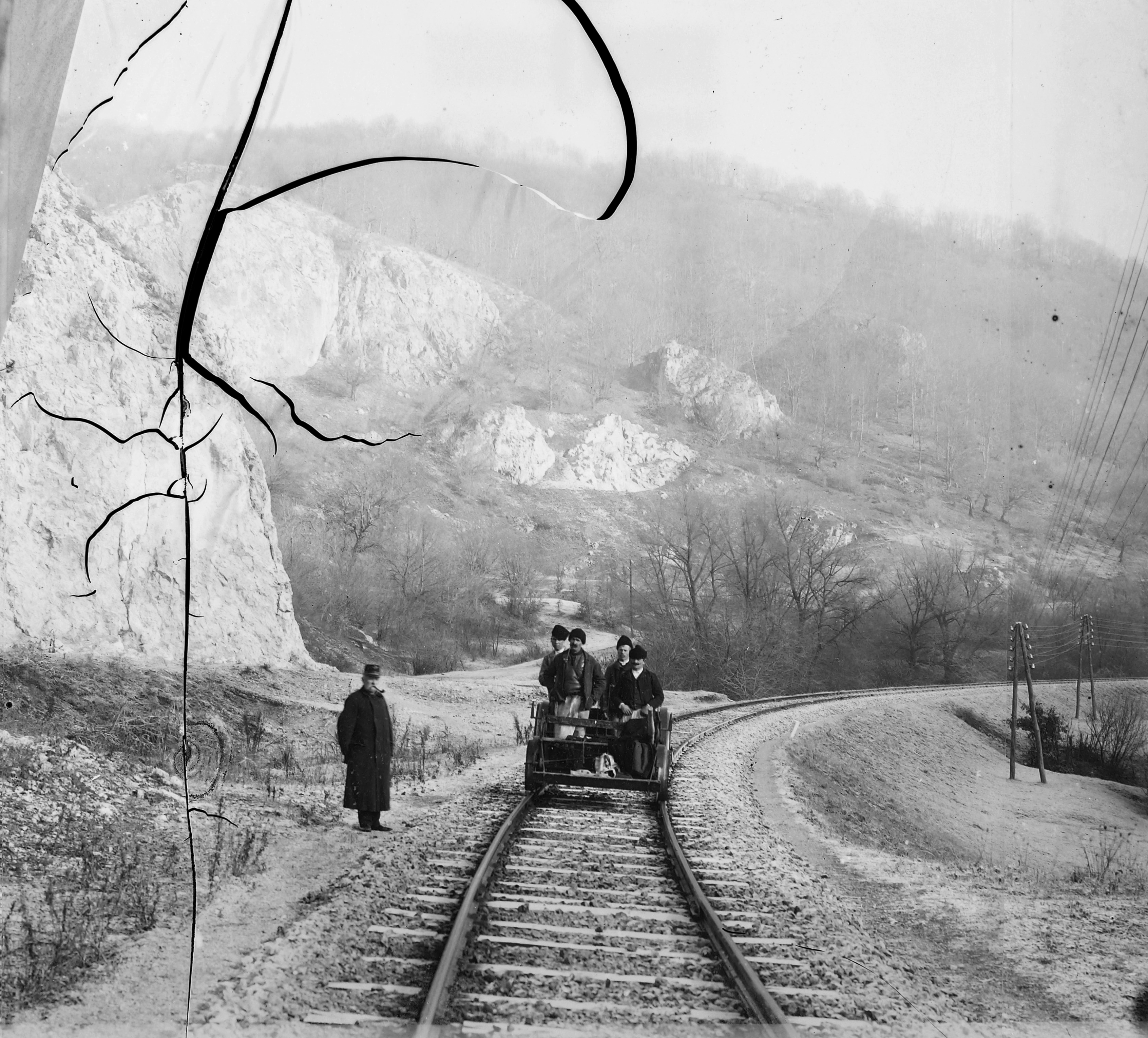 hajtány az Alsórákos és Ágostonfalva közötti vonalszakaszon. Location: Romania, Transylvania Tags: railway handcar Title: hajtány az Alsórákos és Ágostonfalva közötti vonalszakaszon.